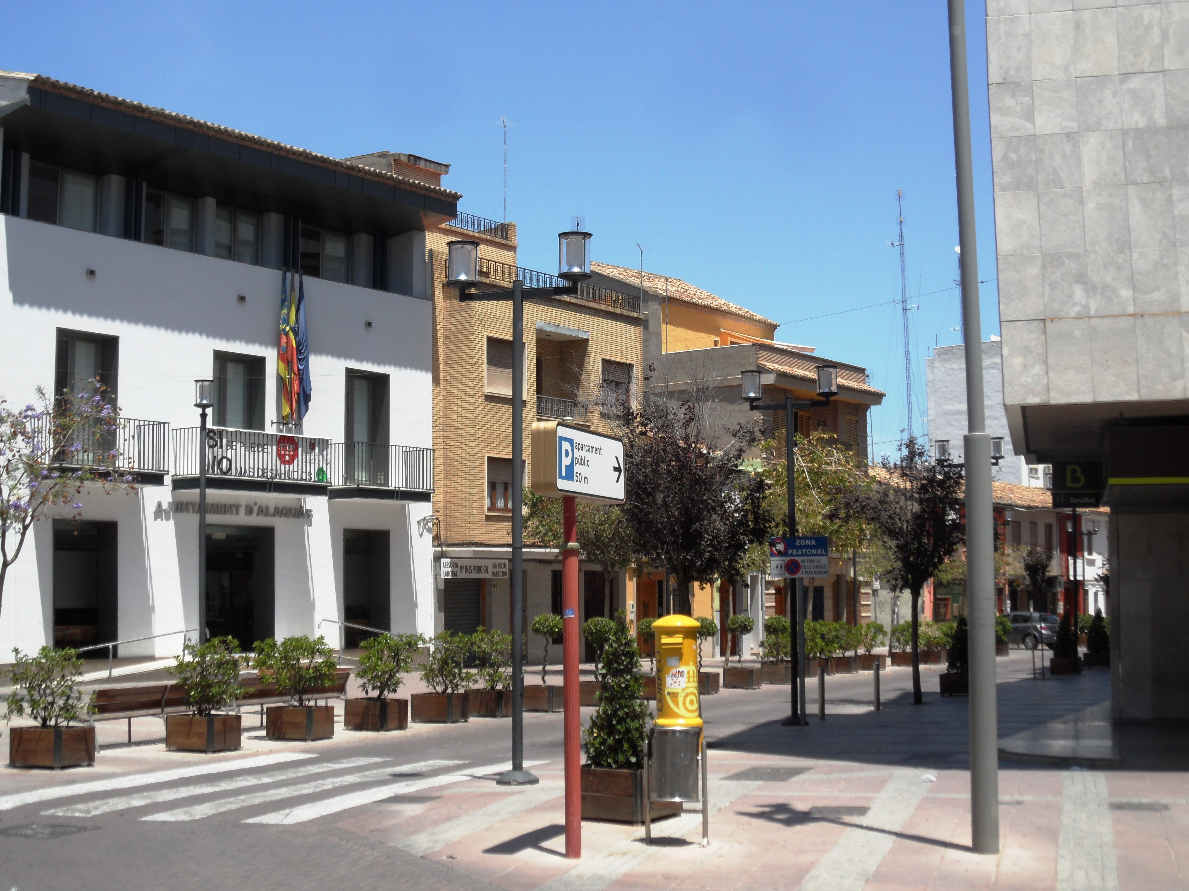 Carrer Major i ajuntament.